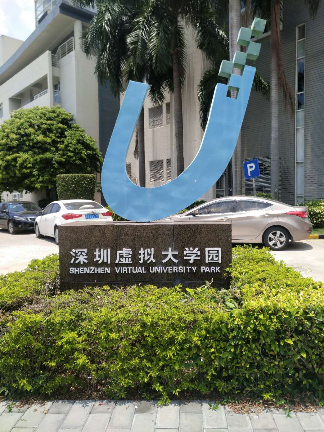 中文（中国大陆）: 这是深圳虚拟大学园的标志。